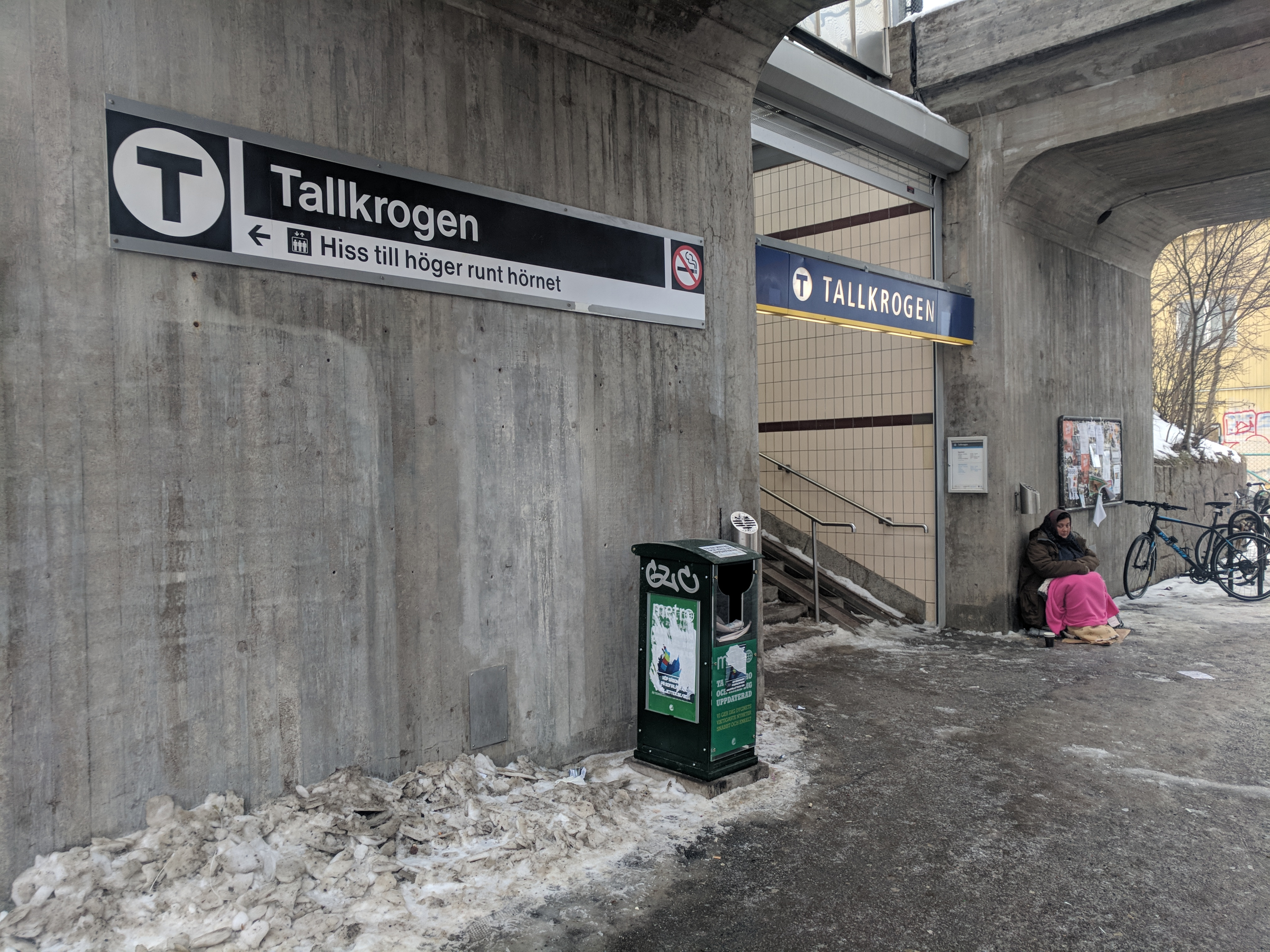 Tallkrogen metro